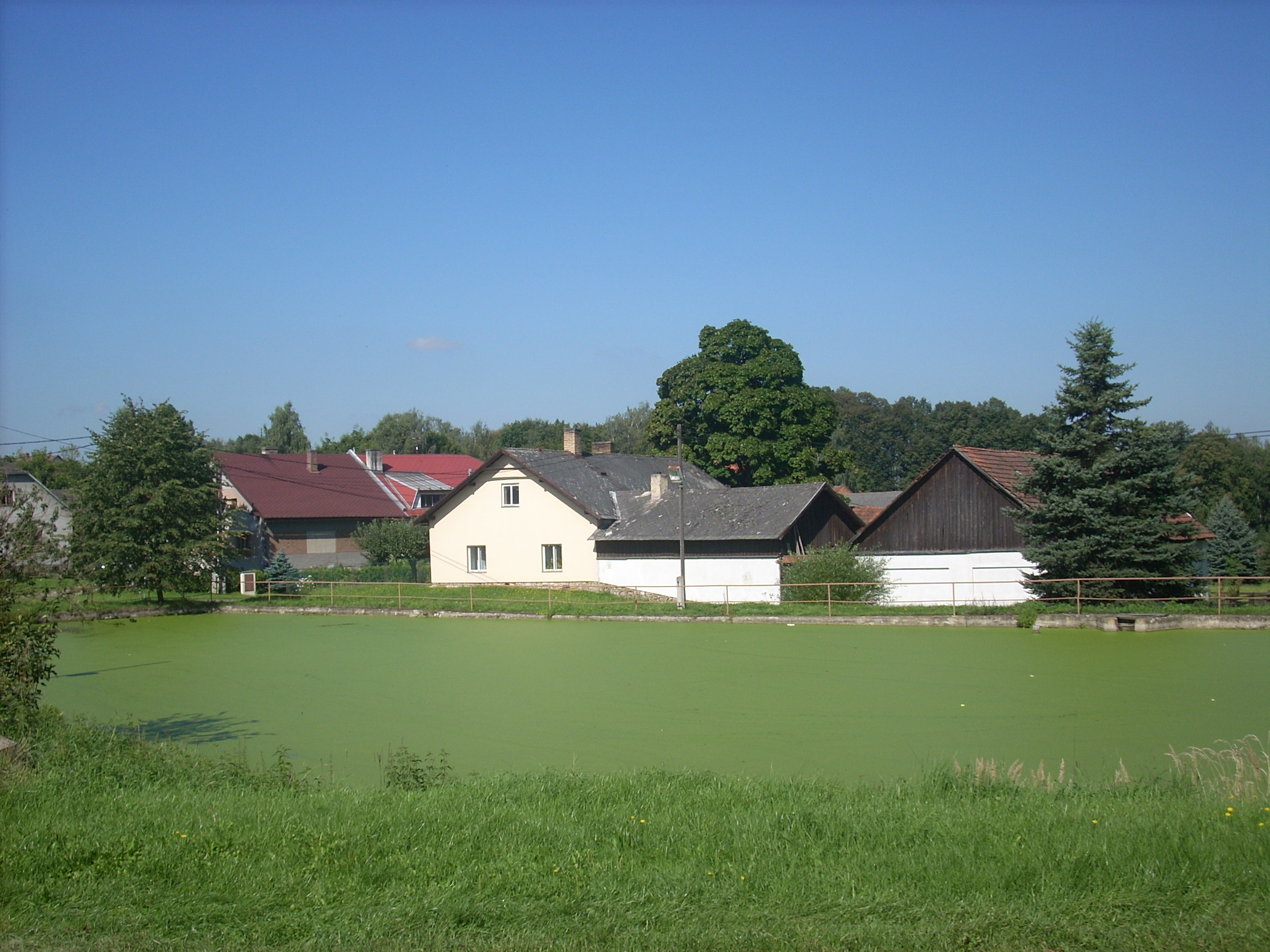 Nove Dvory Polna rybnik